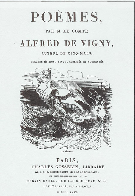 Page de titre de l'édition 1829 des Poèmes d'Alfred de Vigny, lithographie.